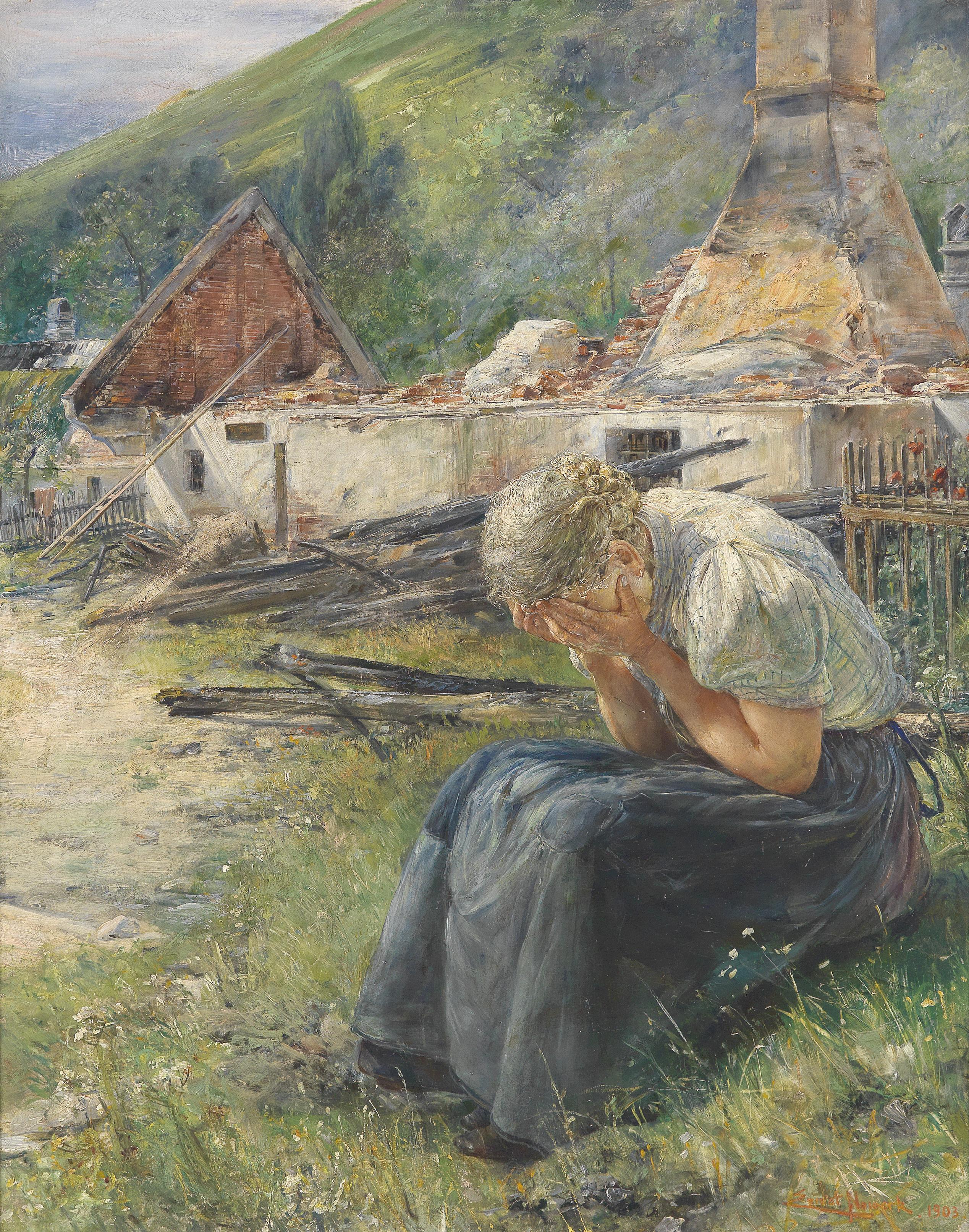 Am Tag danachtitle QS:P1476,de:"Am Tag danach" label QS:Lde,"Am Tag danach"The Day Aftertitle QS:P1476,en:"The Day After" label QS:Len,"The Day After"